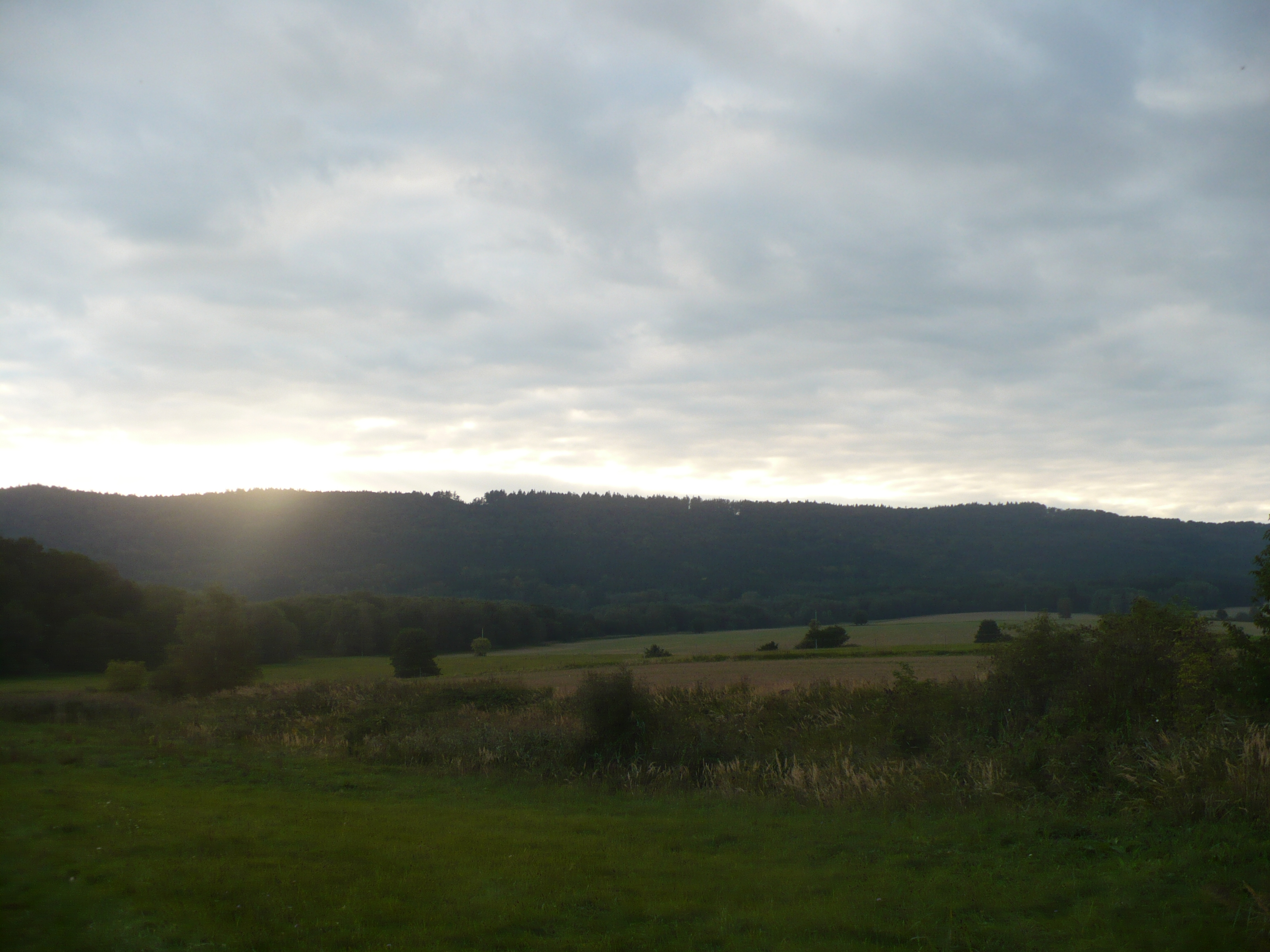 kvalita nic moc:D Třebovské stěny kousek od Rudoltic směr Ostrov